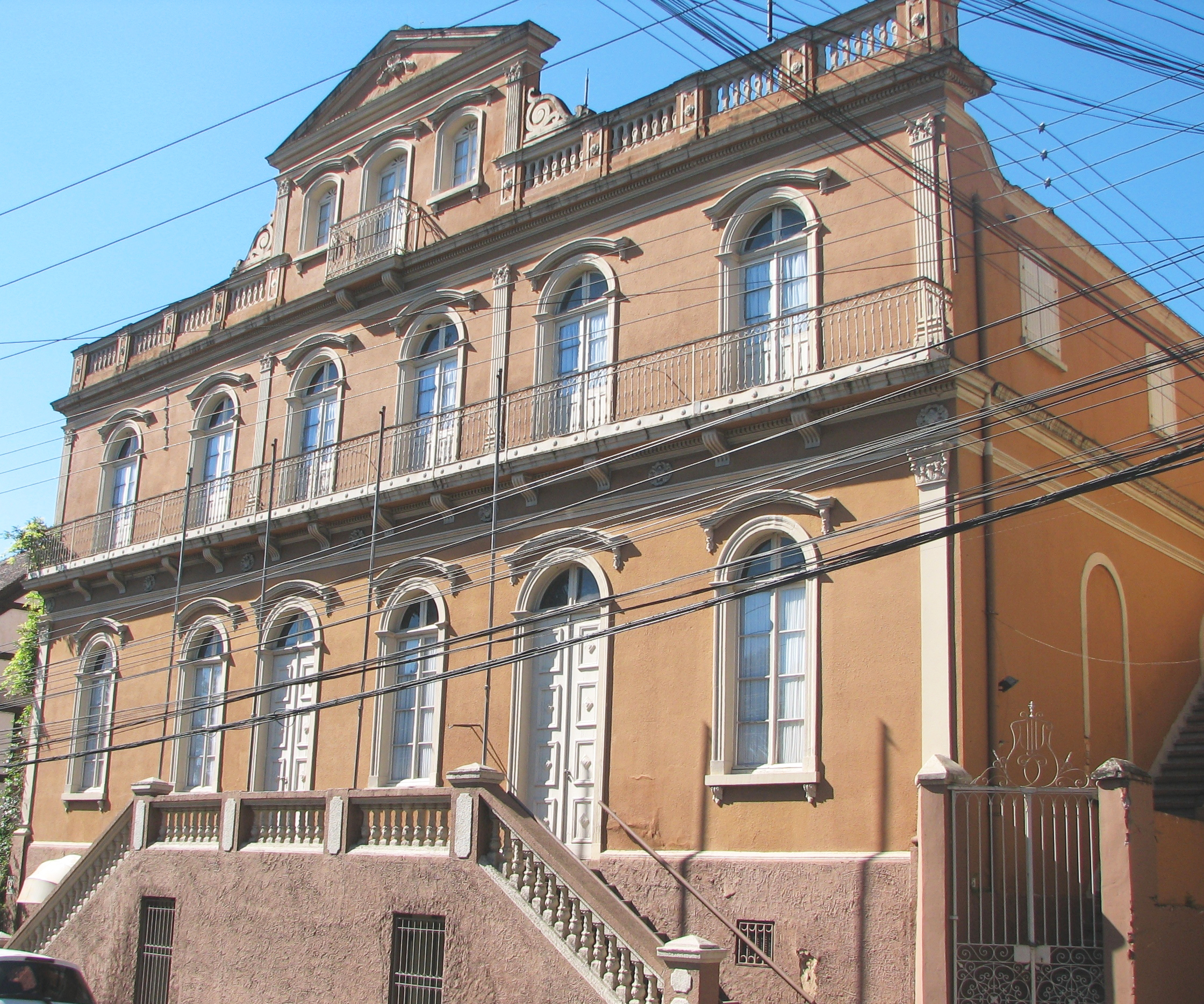 Fachada da Fundação Ernesto Frederico Scheffel, edifício histórico situado em Novo Hamburgo, Rio Grande do Sul - Brasil.